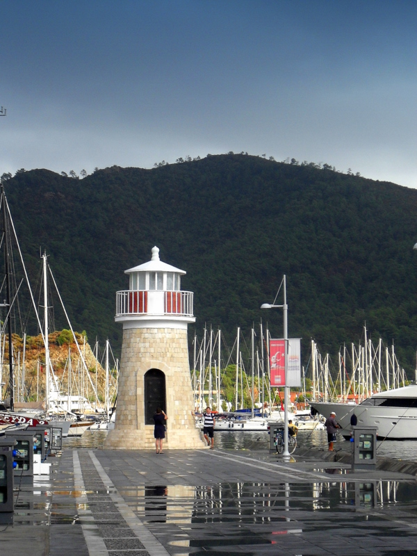 Marmaris, latarnia w porcie jachtowym - 21 września 2011